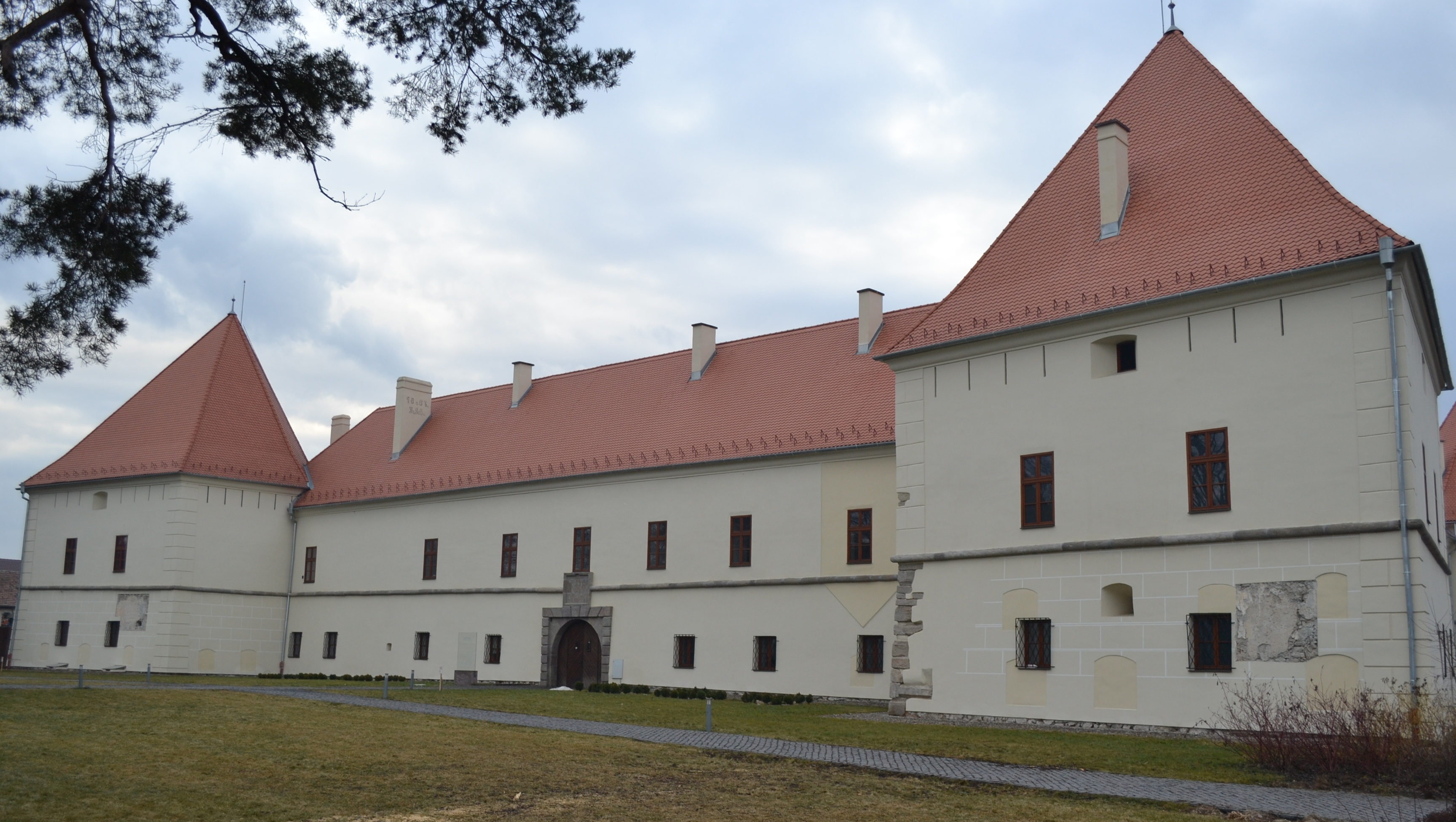 Miko var csikszereda